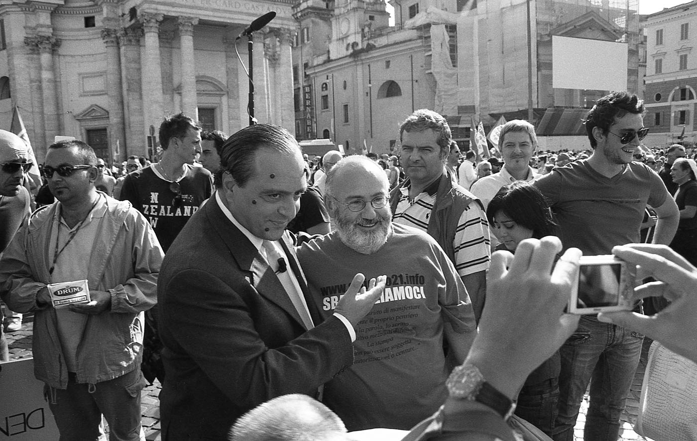 Giampaolo Fabrizio